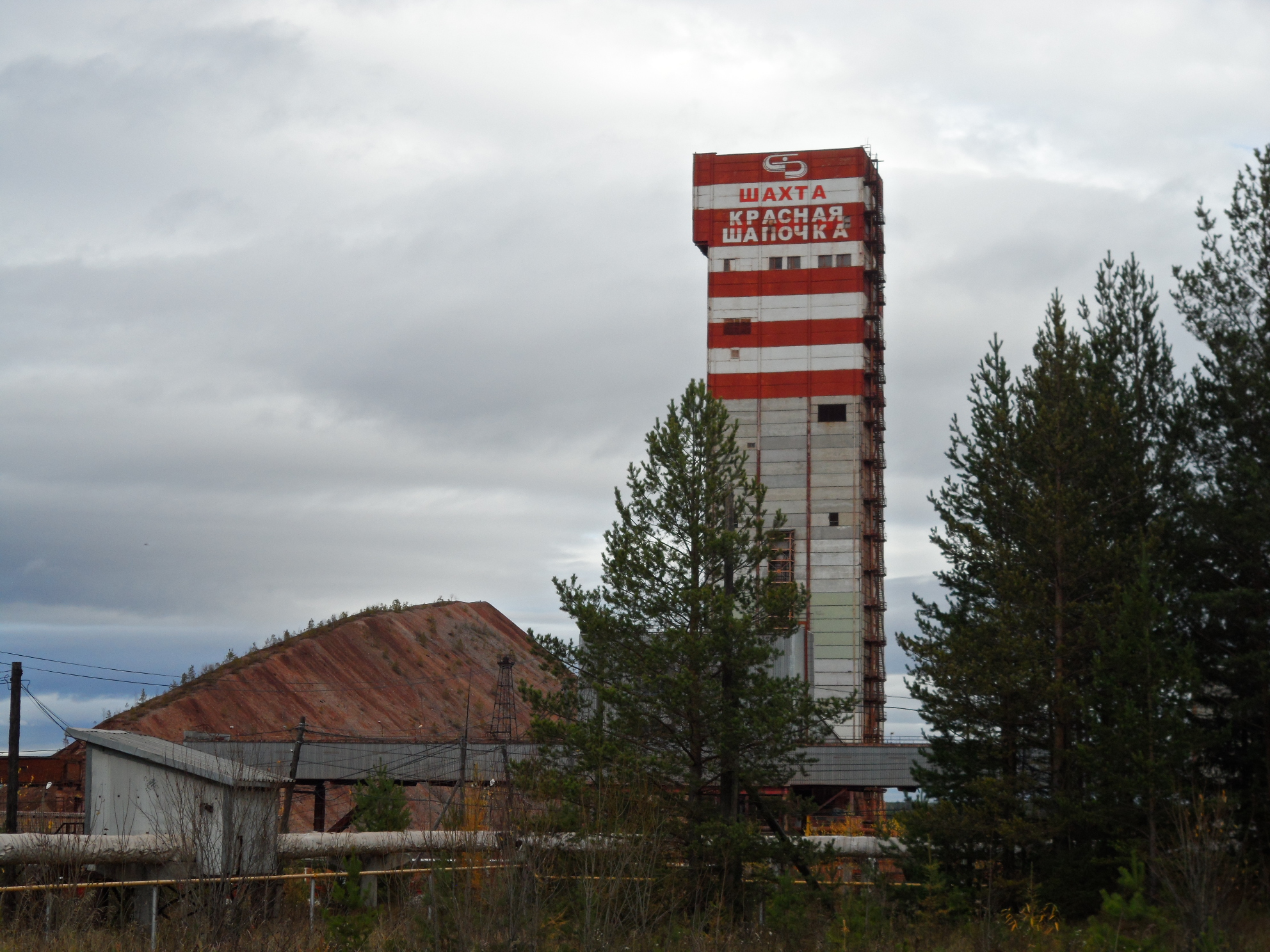 Шахта "Красная шапочка" в городе Североуральске, бокситовые рудники